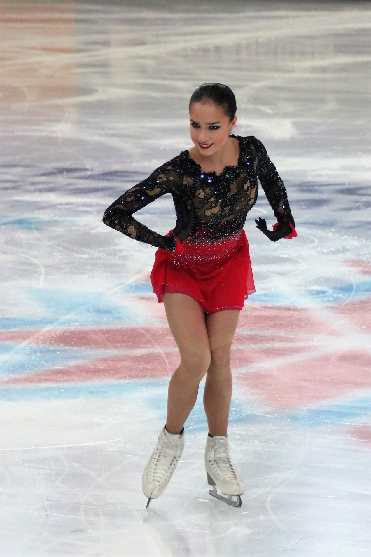 Алина Загитова на чемпионате России по фигурному катанию на коньках 2019